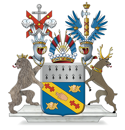 Vaakuna